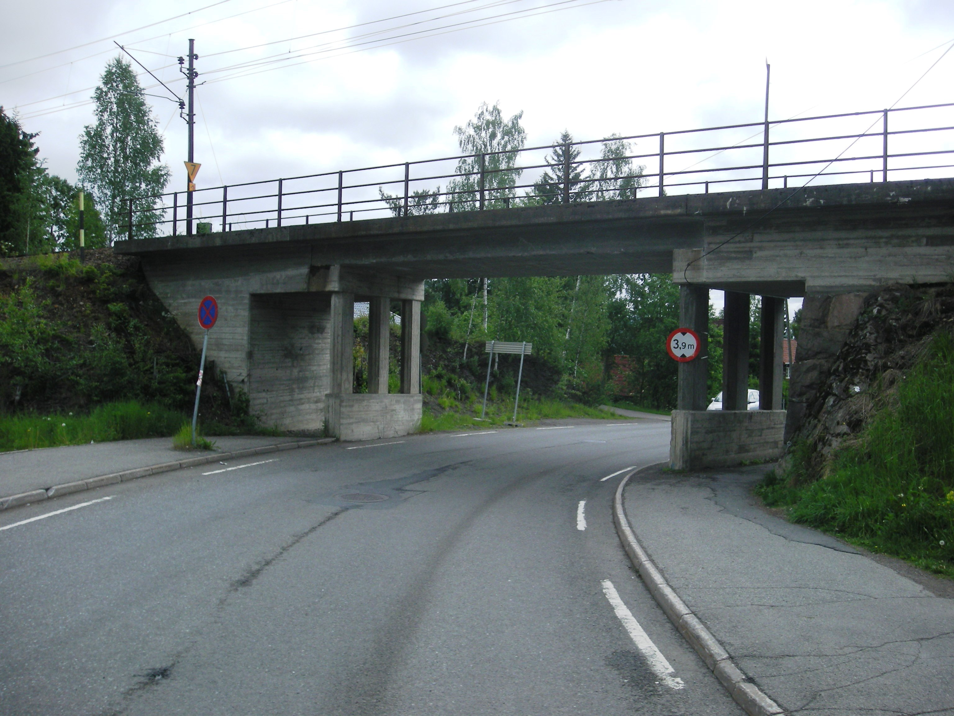 Stasjonsveien er fylkesvei 402 til like nord for denne undergangen ved Nittedal stasjon.